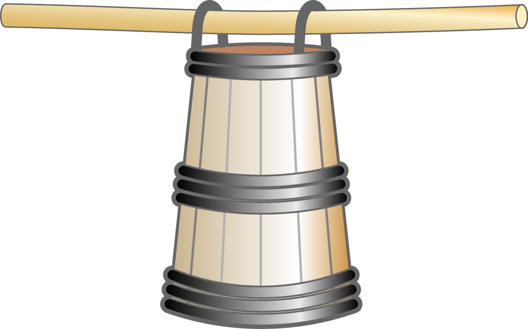 Description Baquet haut en tonnellerie, nommé samau, et sa barre de portage. CC-BY-SA Baquet haut en tonnellerie, nommé samau, et sa barre de portage.